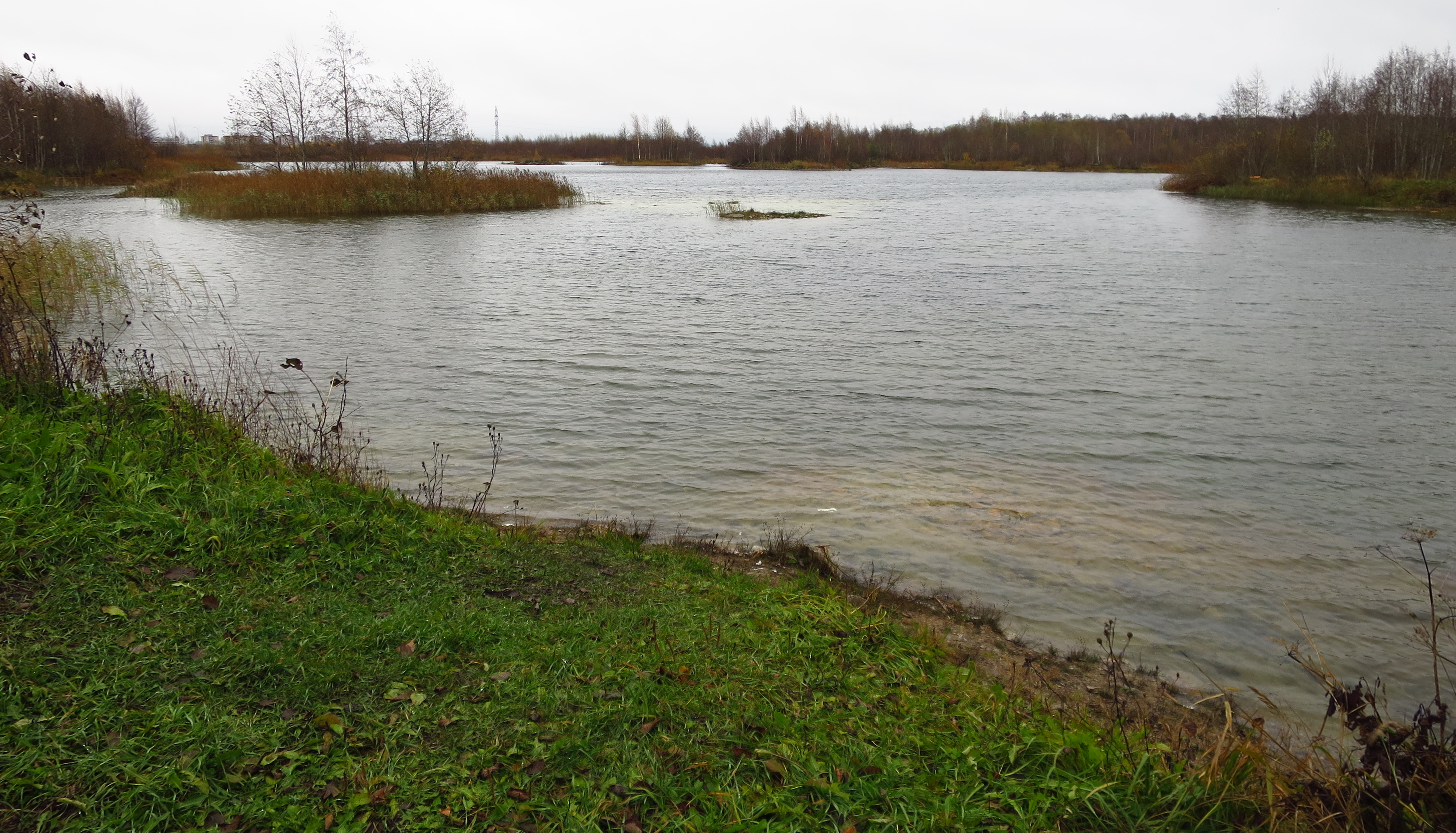 Väike-Kadastiku järv Narvas